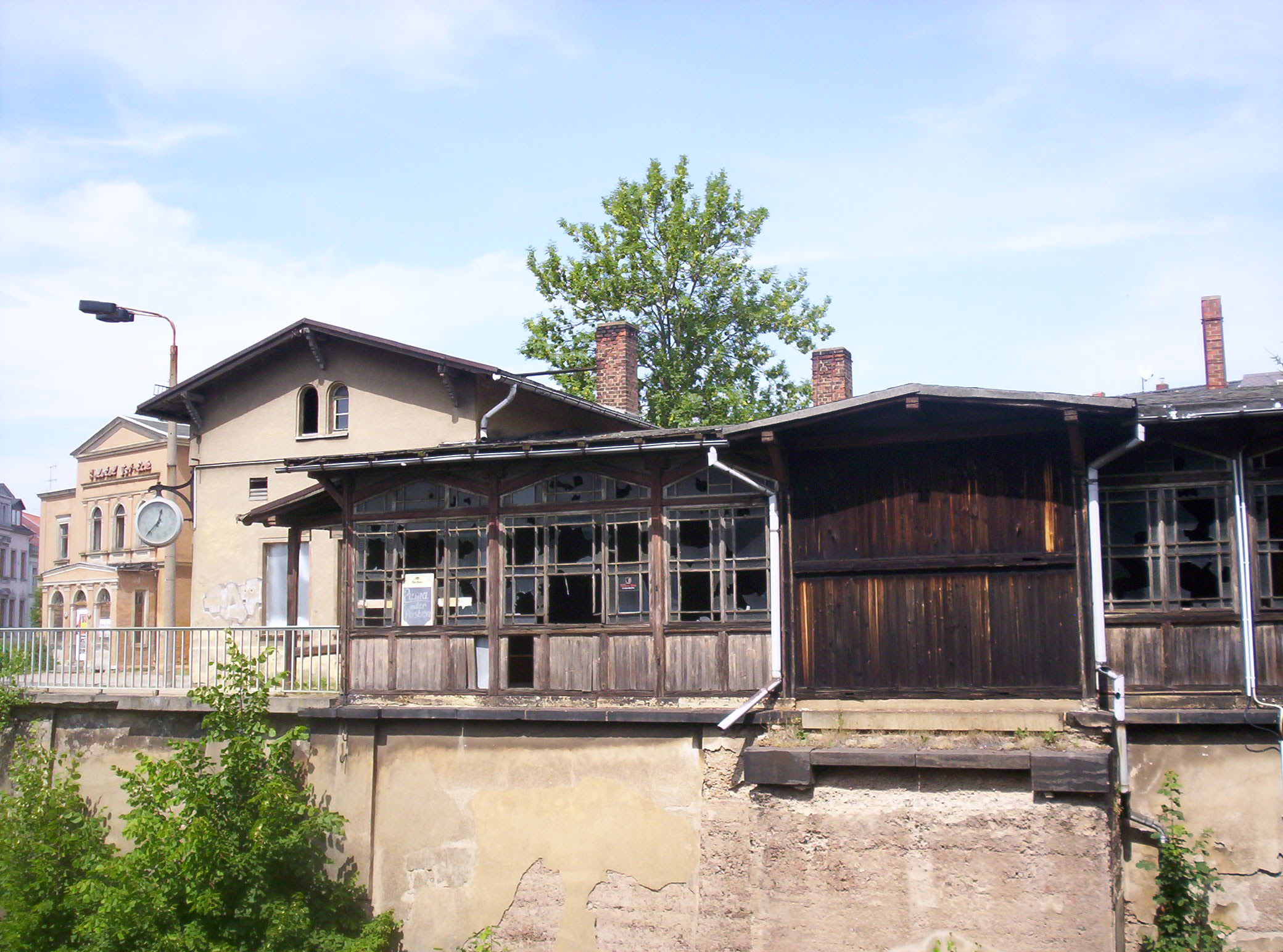 Bahnhof Zentrum, Döbeln, Sachsen